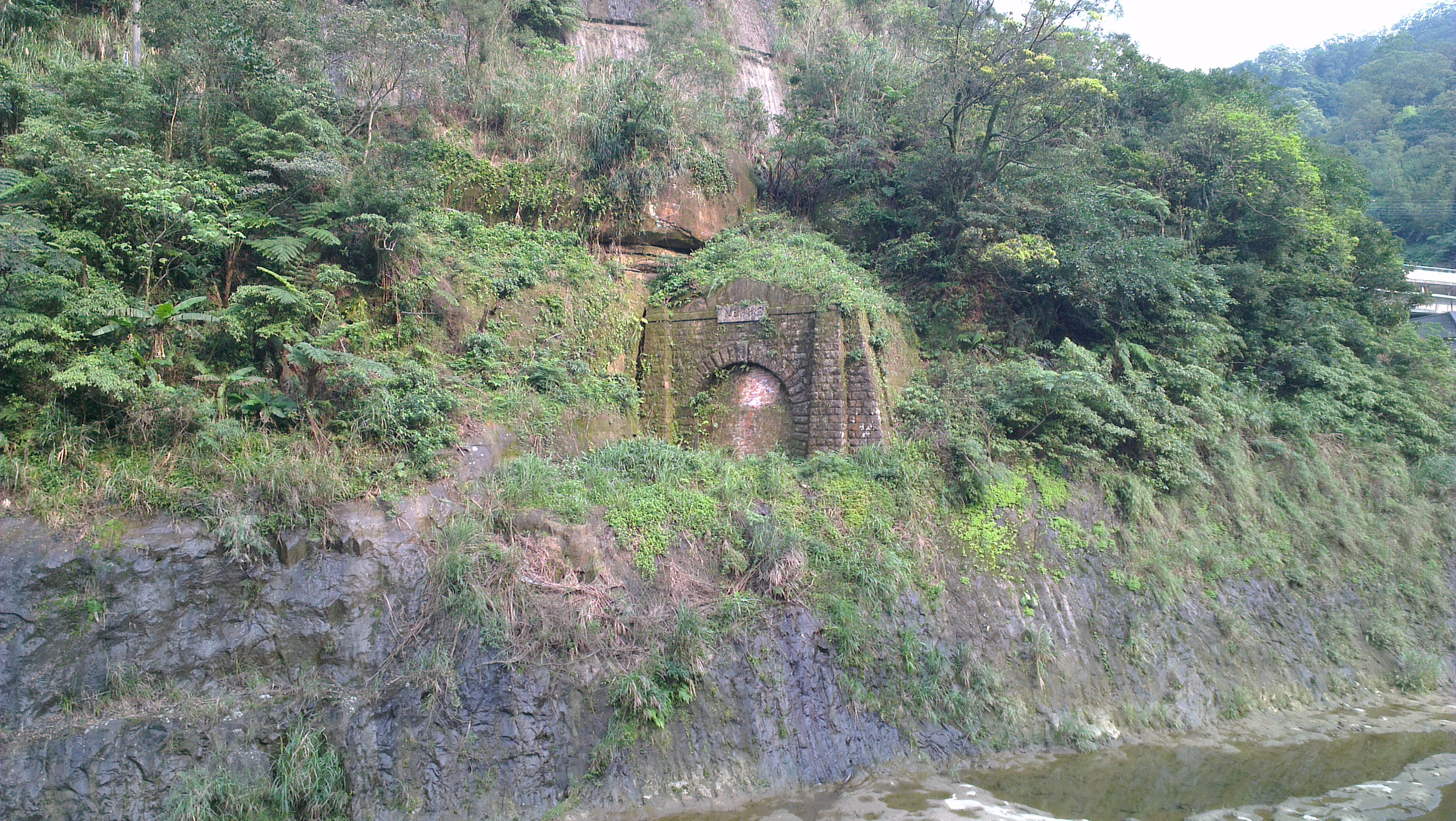 中文（台灣）: 三瓜子隧道